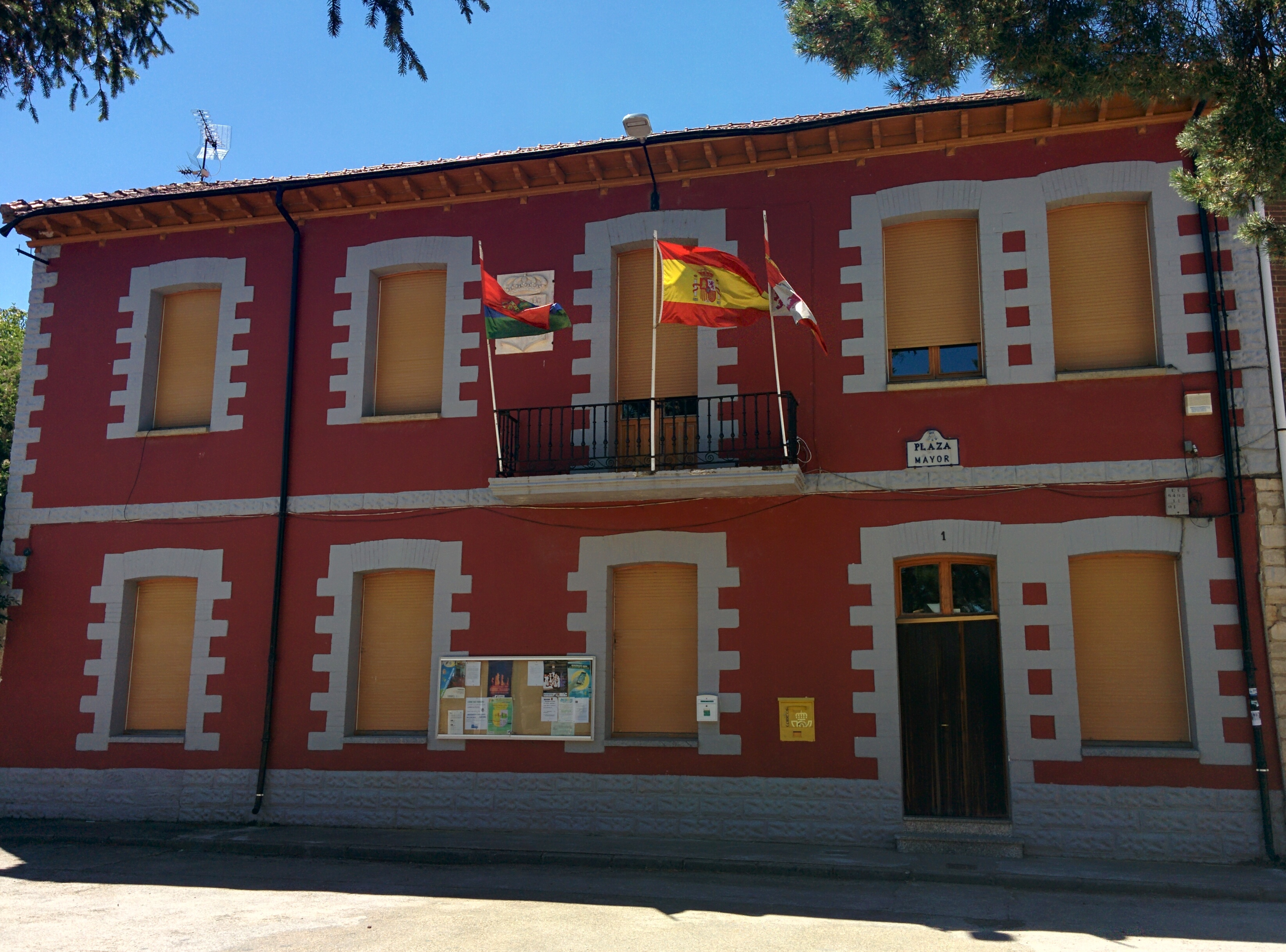 Casa consistorial de Tardajos (Burgos, España).